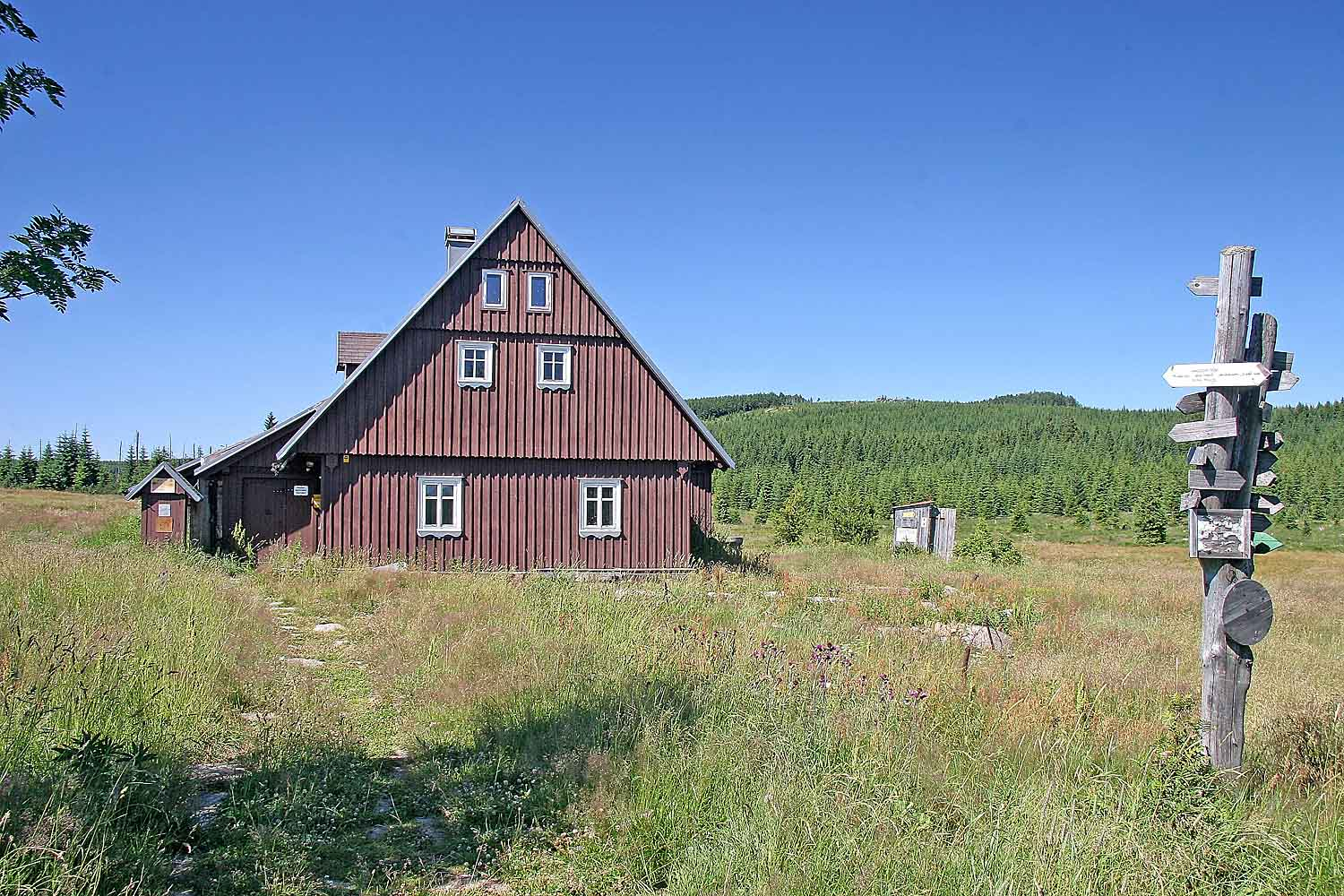 Osada Jizerka - Hnojný dům, Jizera Mountains, district Jablonec nad Nisou, Czech Republic Autor: Prazak date: 18. 7. 2006